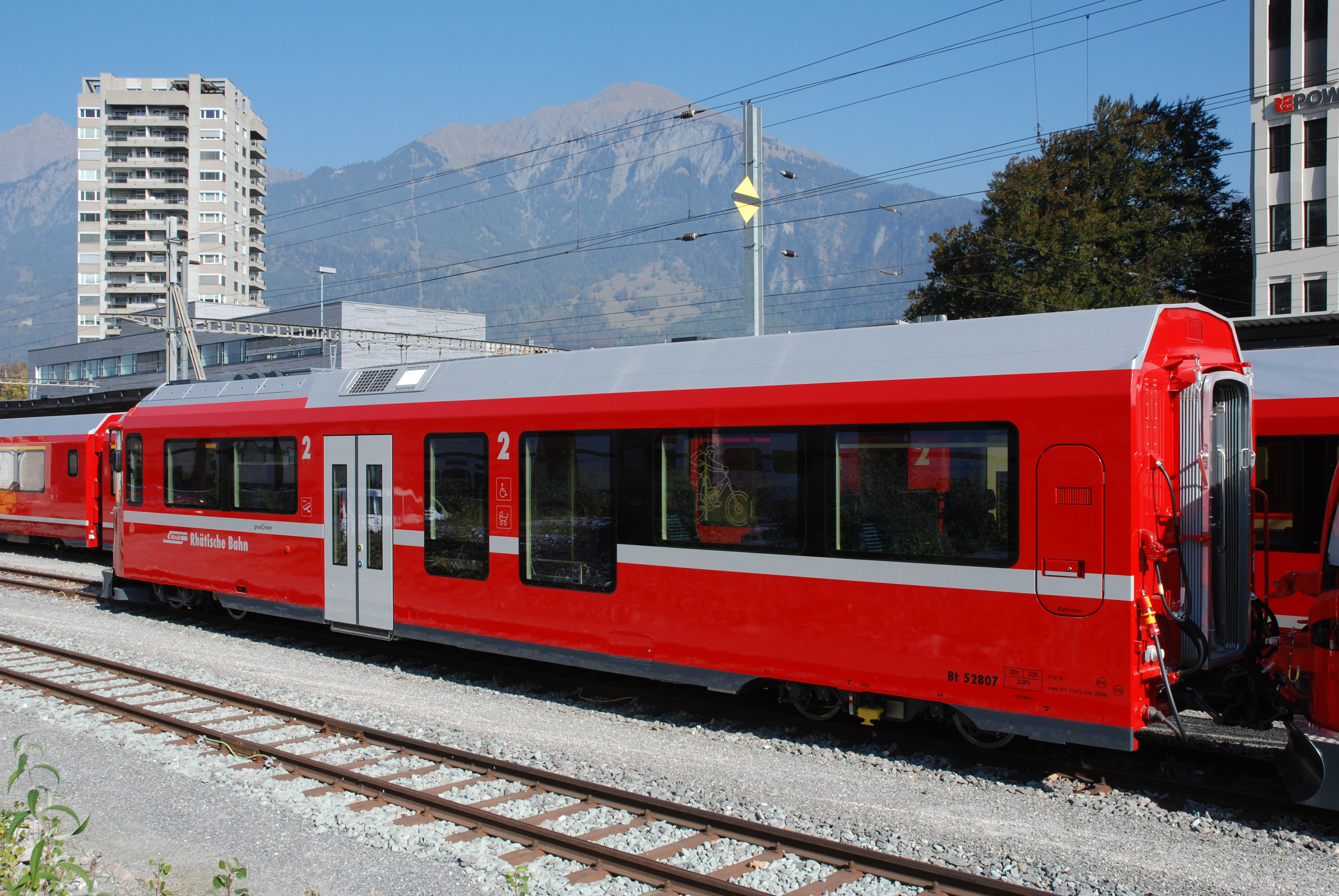 RhB Steuerwagen Bt 528